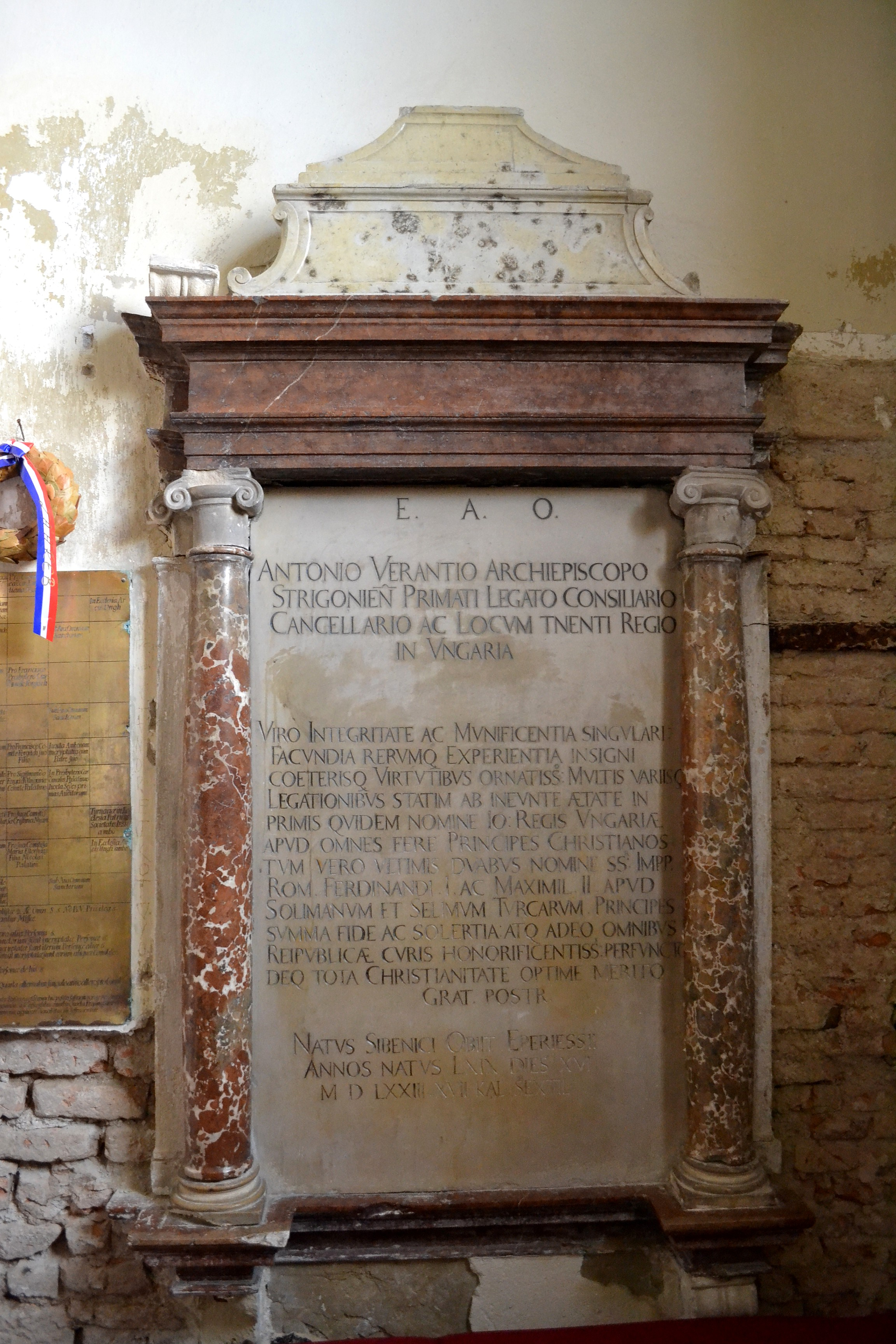 Trnava, Bazilika svätého Mikuláša, náhrobok ostrihomského arcibiskupa, kardinála Antona Vrančiča (Antonio Verantio) z roku 1573 v ľavej lodi